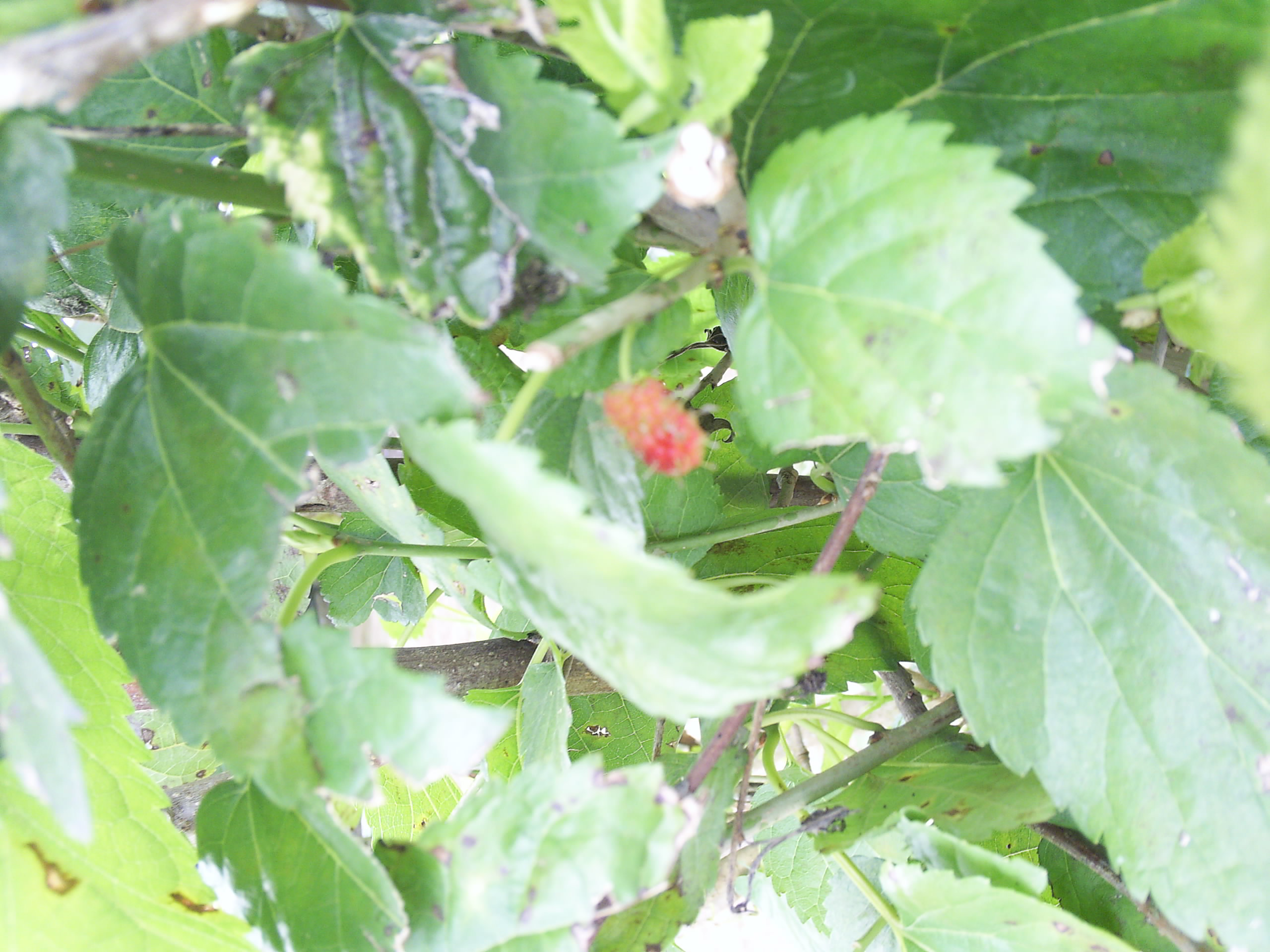 Morus nigra